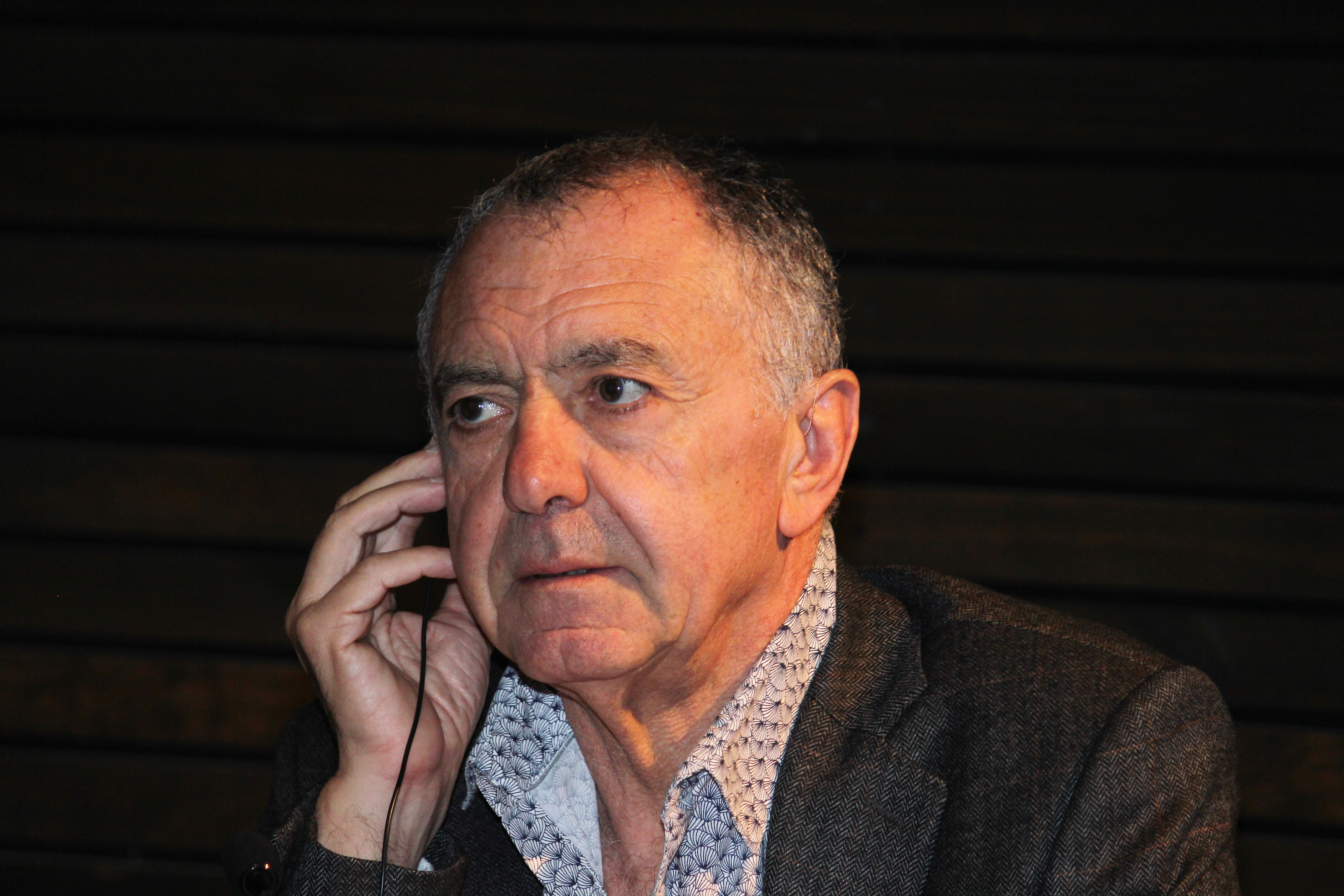 El filósofo francés Gilles Lipovetsky durante su conferencia «El individualismo en la época hipermoderna», dada en el auditorio de la Biblioteca Nicanor Parra (Universidad Diego Portales) el 9.11.2018.